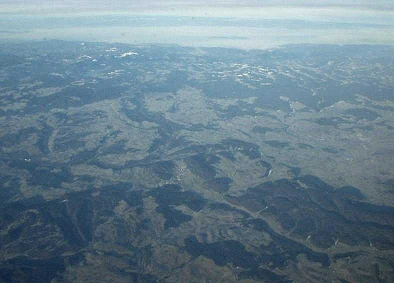 Schwarzwald Süd, mit schneebedecktem Feldberg im Hintergrund. Von der Bildmitte nach vorn rechts das Tal der Aitrach, darüber das Waldgebiet der Länge. Vorn links der Randen. Knapp links unterhalb der Bildmitte Blumberg mit der Blumberger Pforte und der Wutachablenkung. Rechts im Bild oberhalb der Länge Donaueschingen. Oberhalb der Bildmitte von links nach rechts der Schwarzwald vom Hochblauen links bis zum Hünersedel rechts. Der Feldberg mit Schneebedeckung. In der Mitte die Breisgauer Bucht mit dem Kaiserstuhl, in der Rheinebene Nebel, darüber in der Ferne die Vogesen.